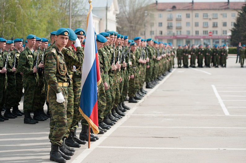 3-я гвардейская отдельная Варшавско-Берлинская Краснознаменная ордена Суворова III степени бригада специального назначения на параде в честь Дня Победы, Тольятти, Россия